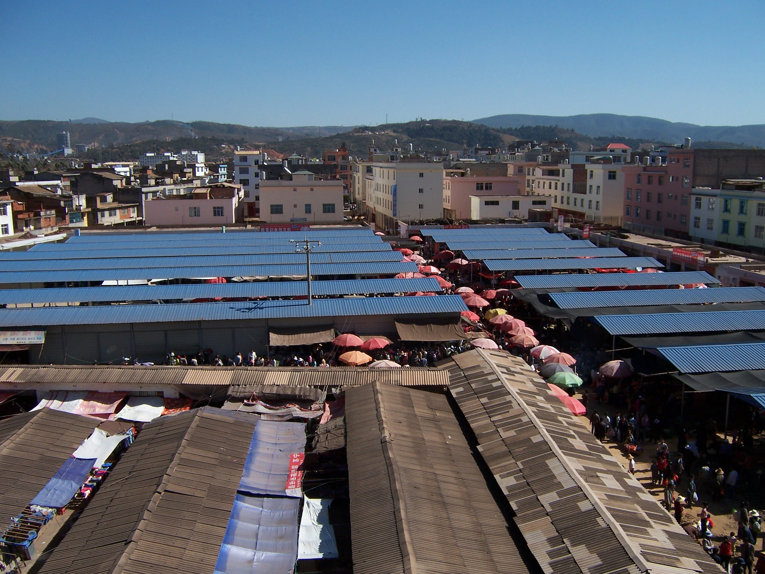 研和农贸市场_from梁云药店